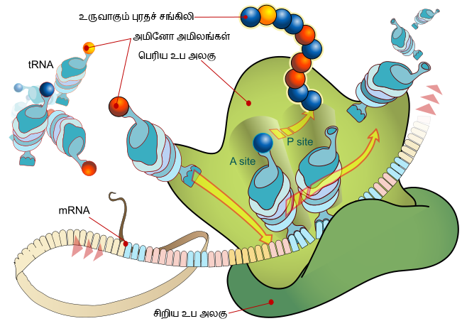 mRNAஆல் கோடோனாக்கப்பட்ட மரபணுத் தகவலைக் கொண்டு tRNAஆல் காவப்படும் அமினோ அமிலங்களை ஒன்றிணைத்துப் இறைபோசோமில் புரதச் சங்கிலியை ஆக்கும் மொழிபெயர்ப்புச் செயன்முறை.